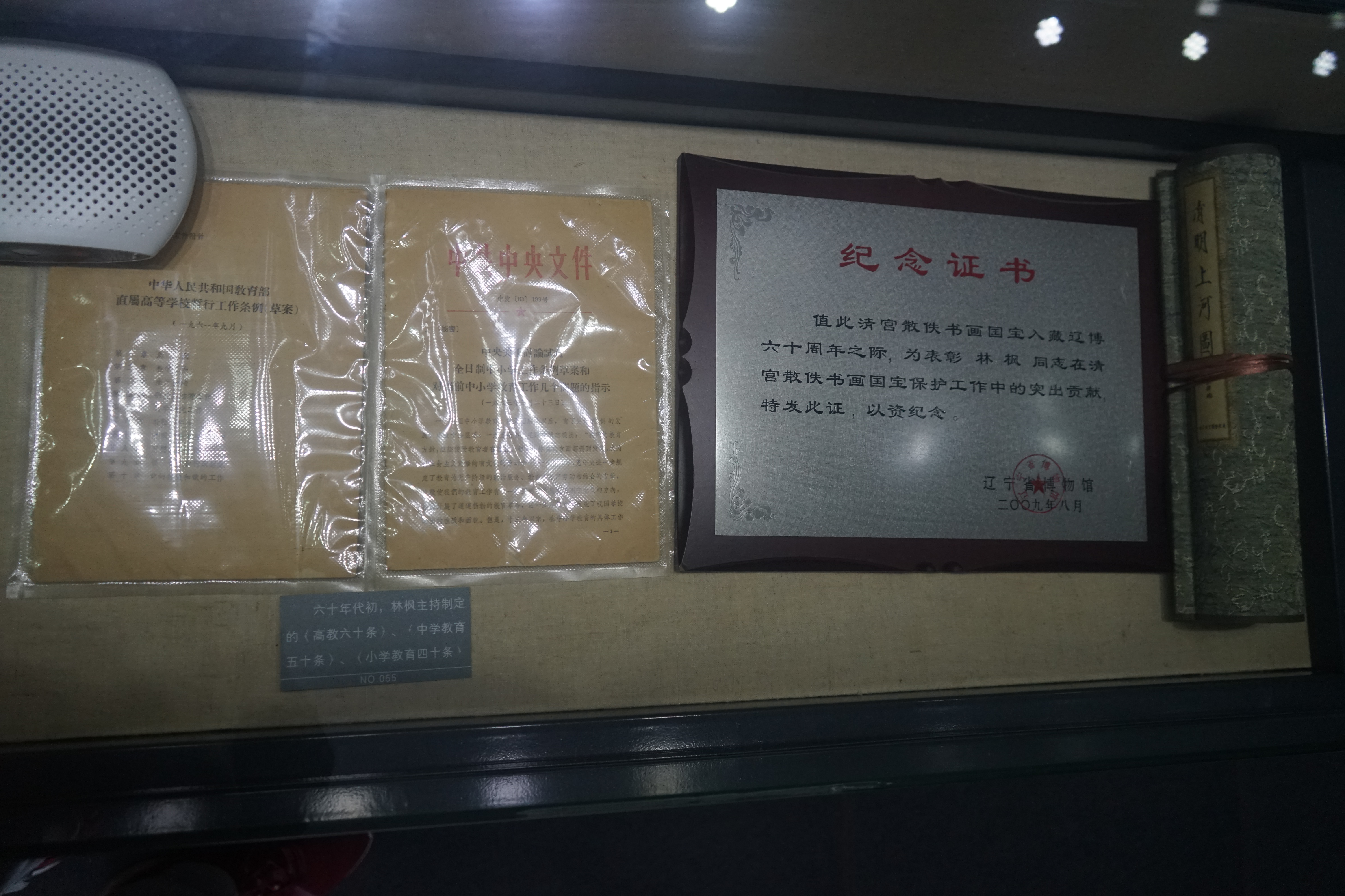 中文（中国大陆）: 林枫1960年代制定的教育文件